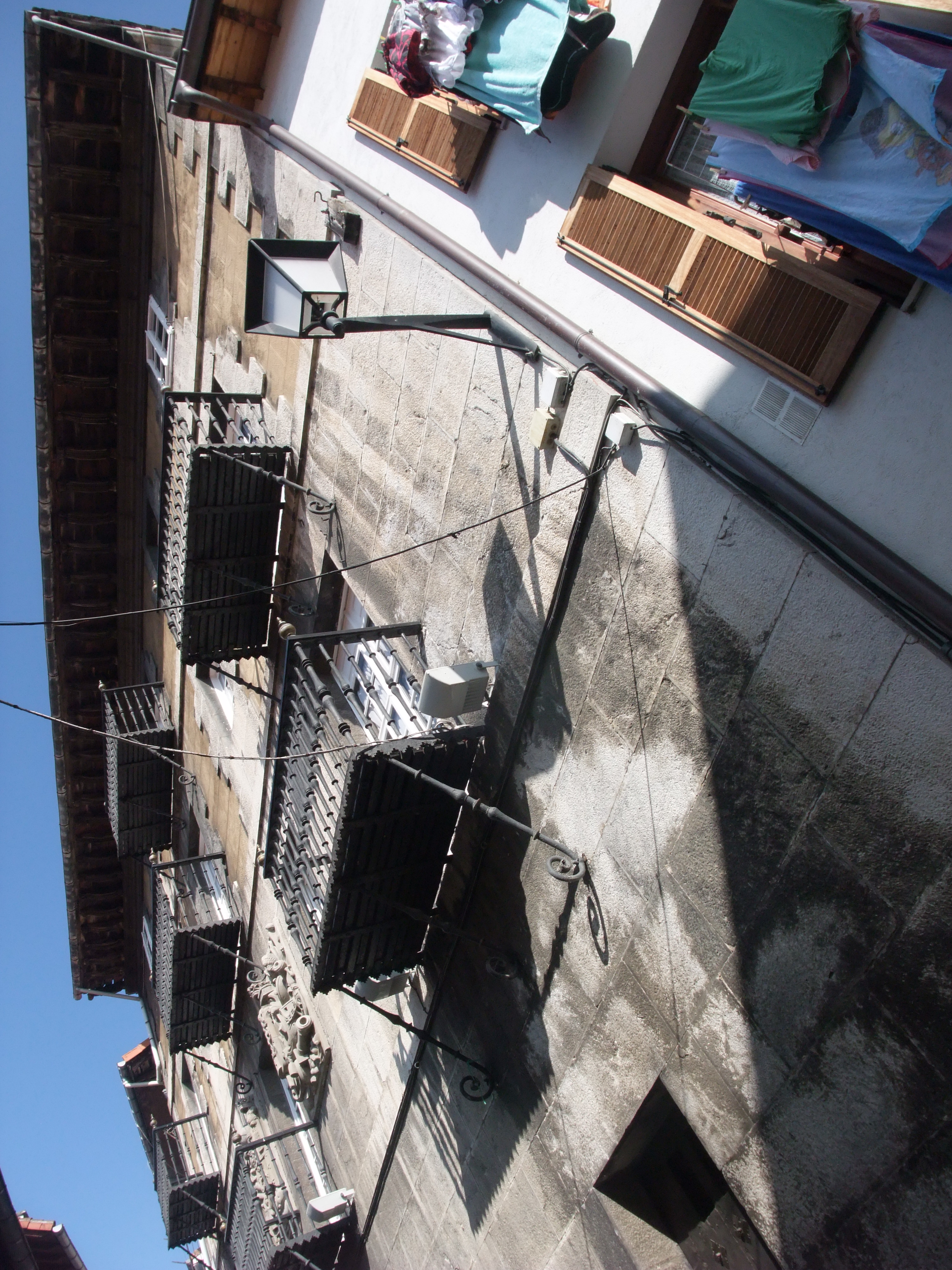 Mutriku (Guipúzcoa): Palacio Arrietakua.